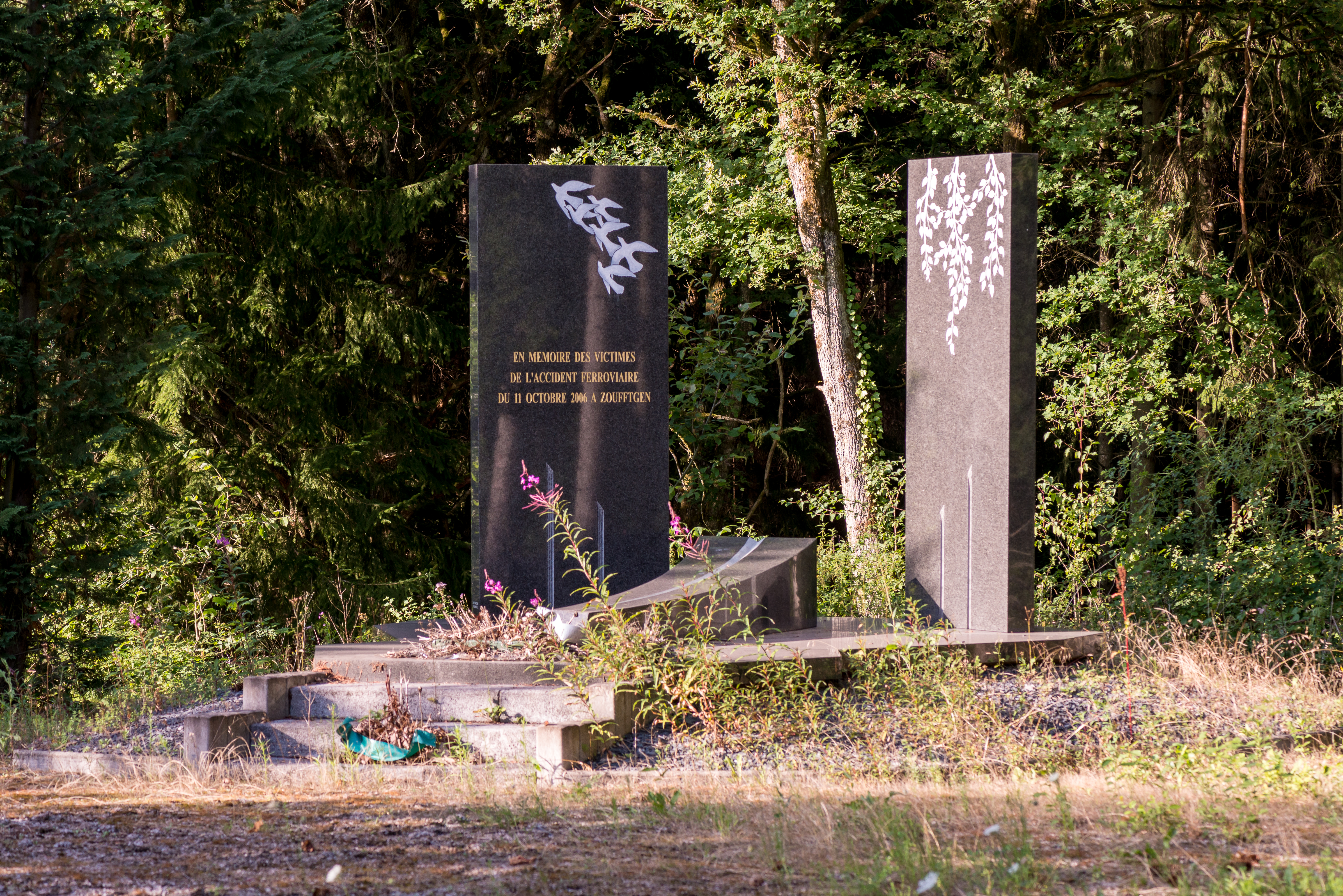 D'Monument am «Landweringen»-Bësch zu Zoufftgen fir d'Affer vum Zuchaccident vum 11. Oktober 2006.